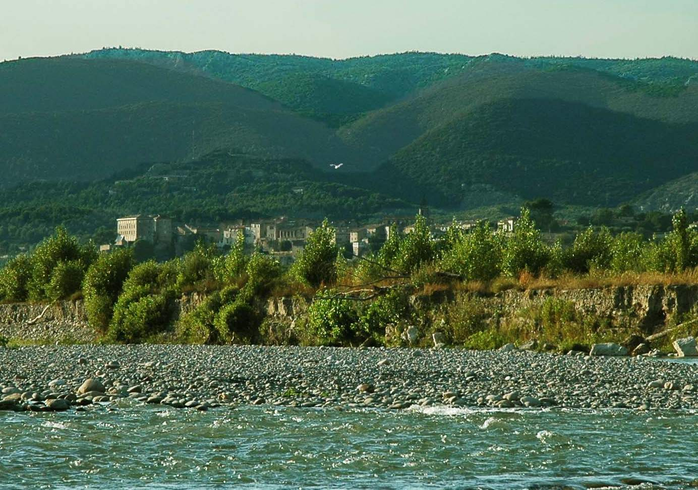 Lauris réalisée par Alain Eli